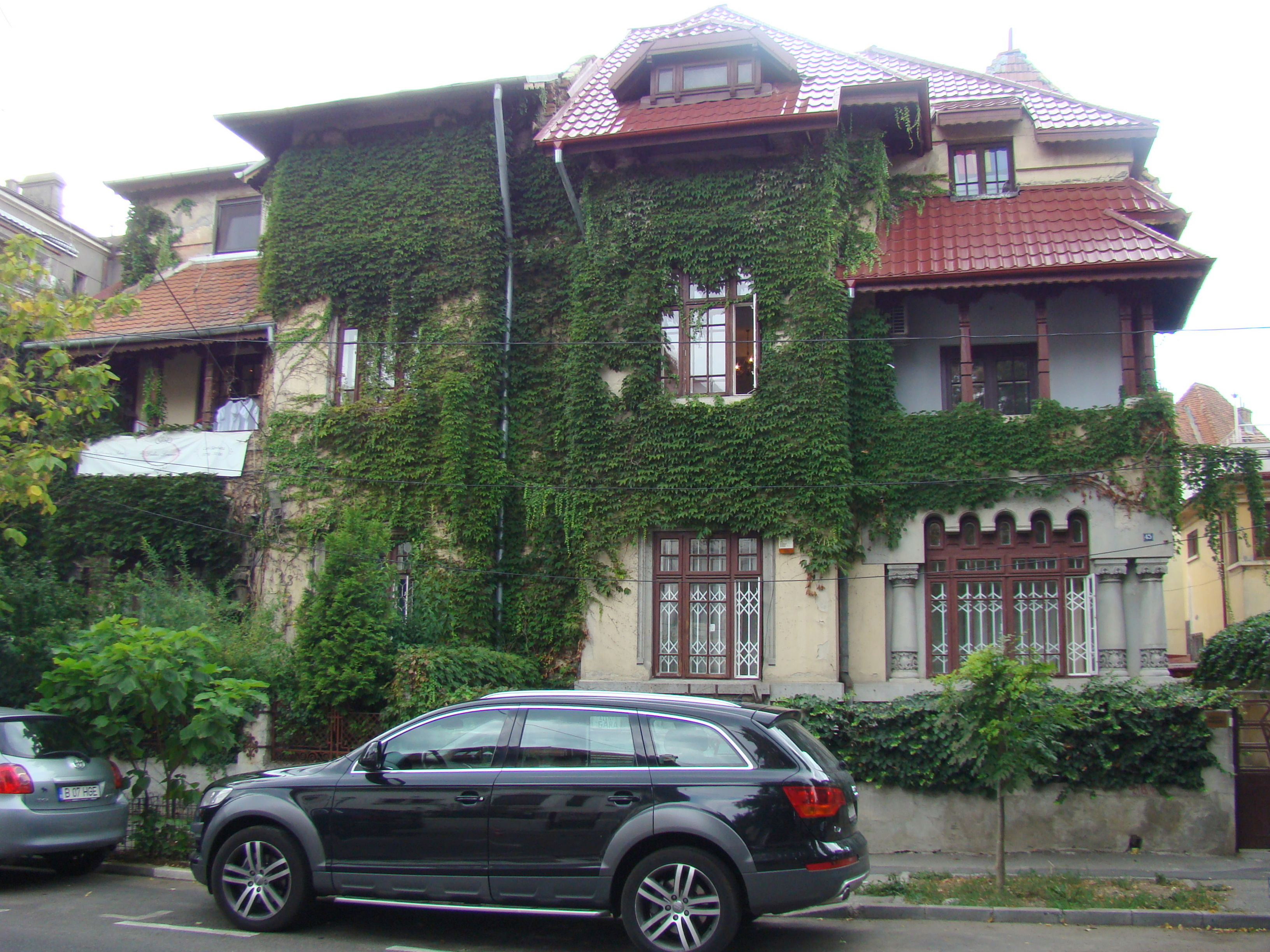 Casă monument istoric, str.Londra, nr. 43-45